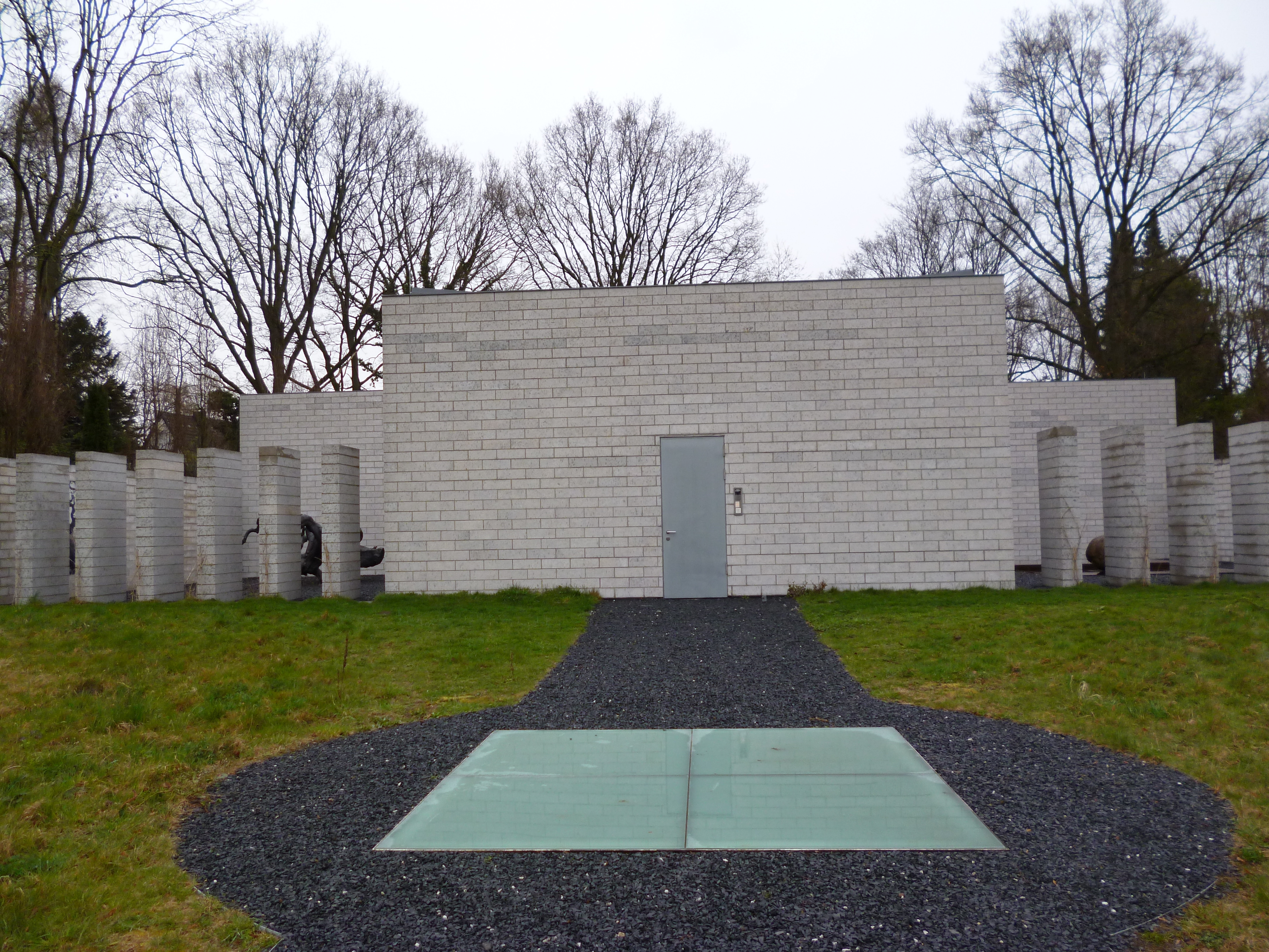 Situation Kunst in Bochum-Weitmar.